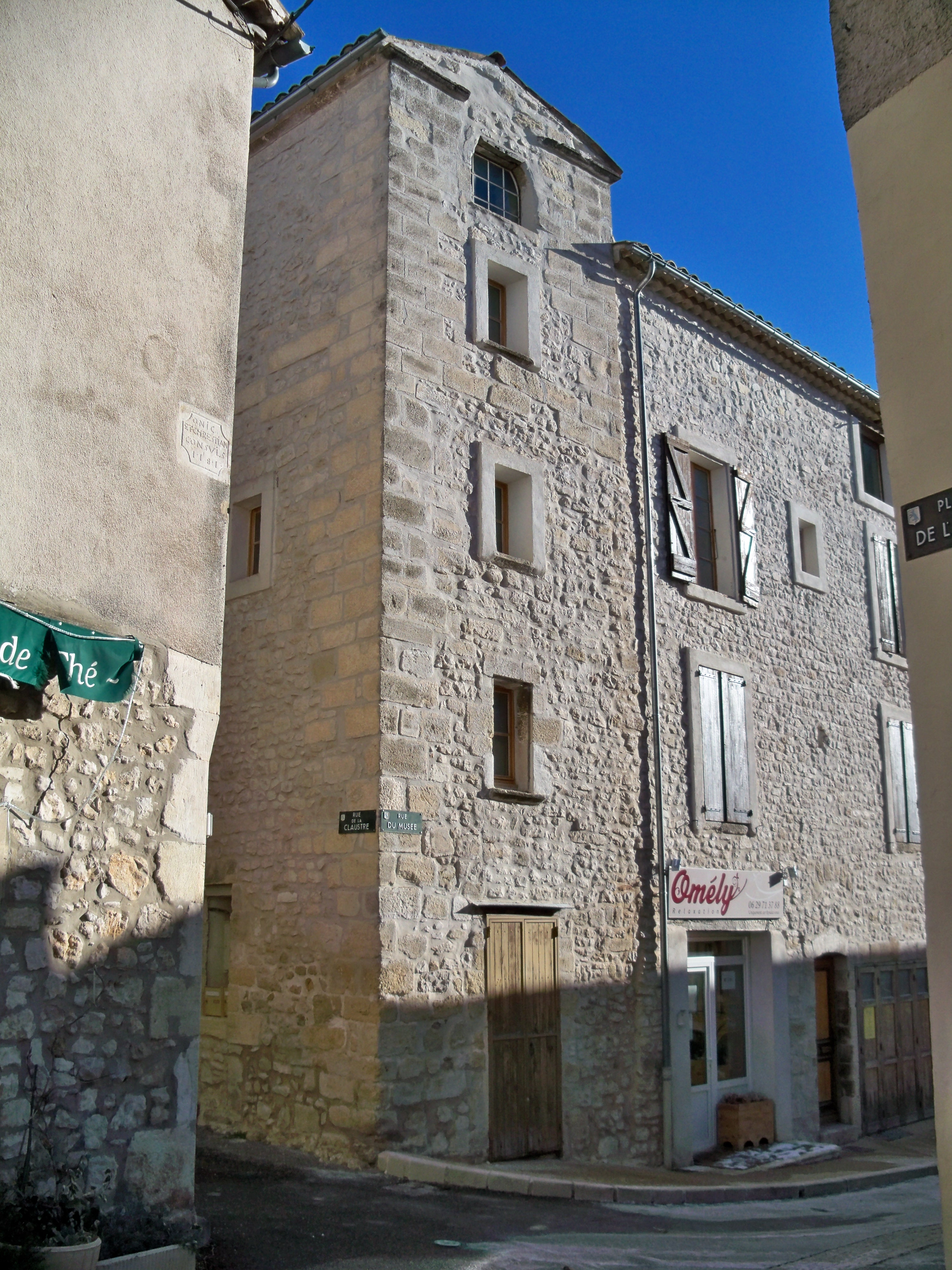 Maison, proche de l'église de Sault (Vaucluse)